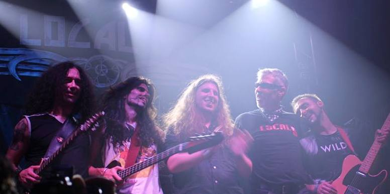 Local 9